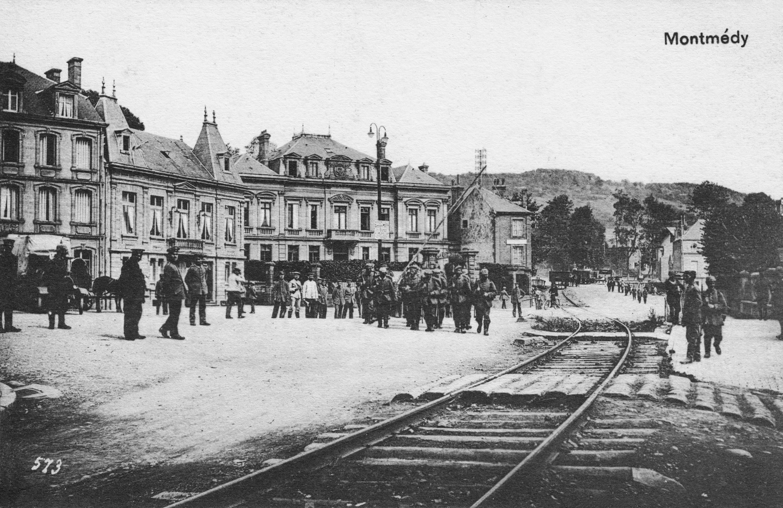 Deutsche Feldpostkarte aus dem 1. Weltkrieg. "Montmédy"